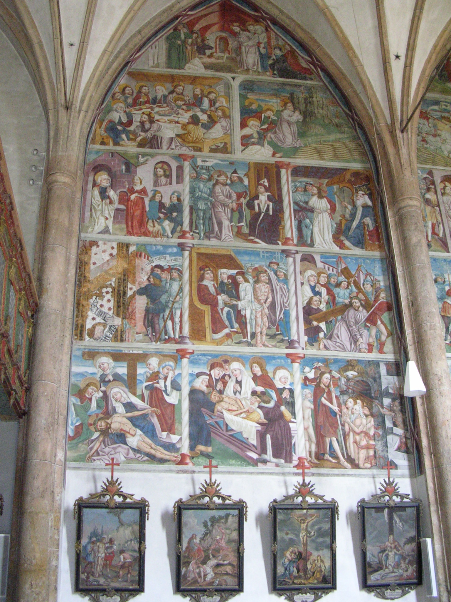 Virgen, Wallfahrtskirche Maria Schnee Innen